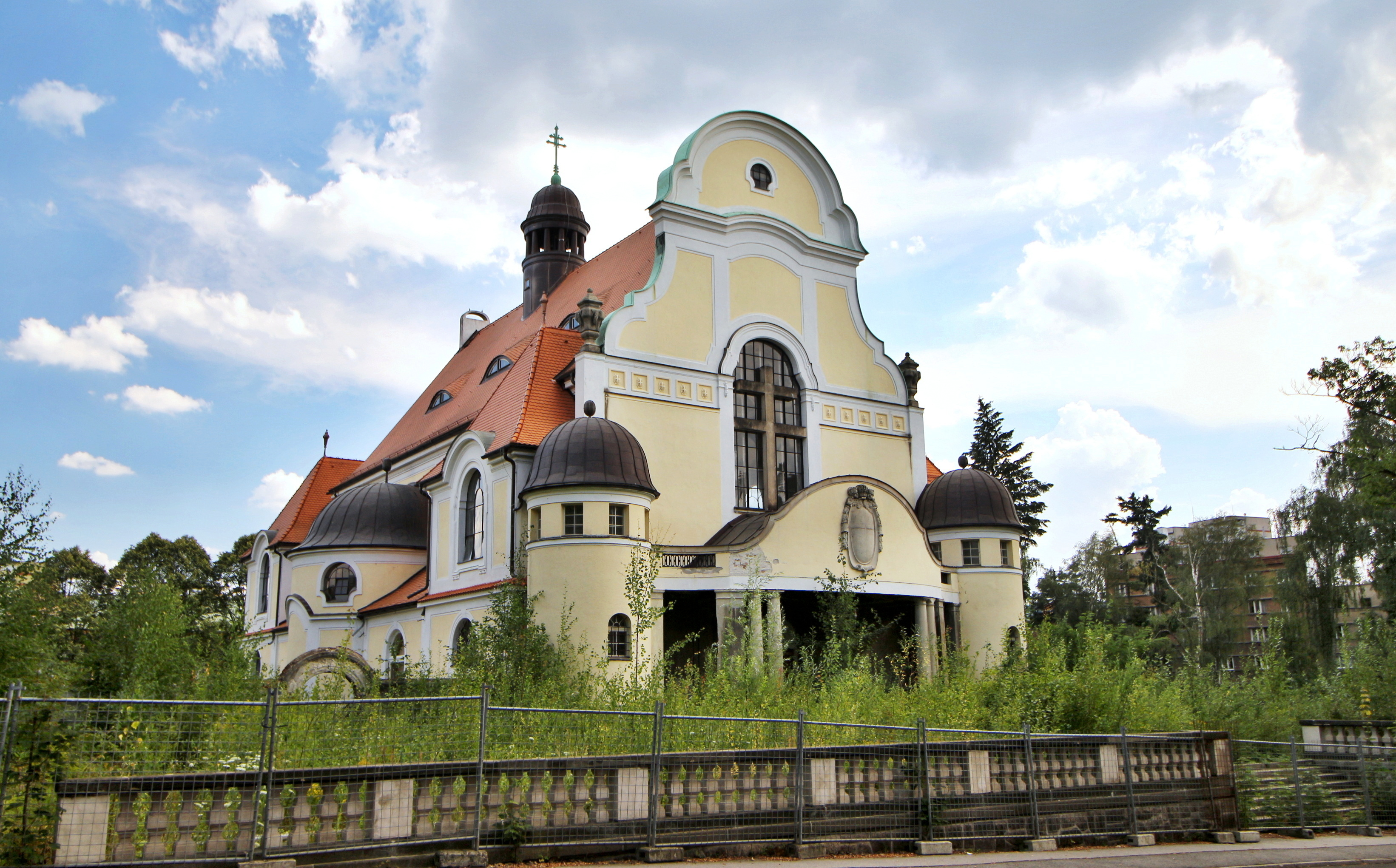 Kapucínský klášter a kostel sv. Máří Magdalény v Liberci